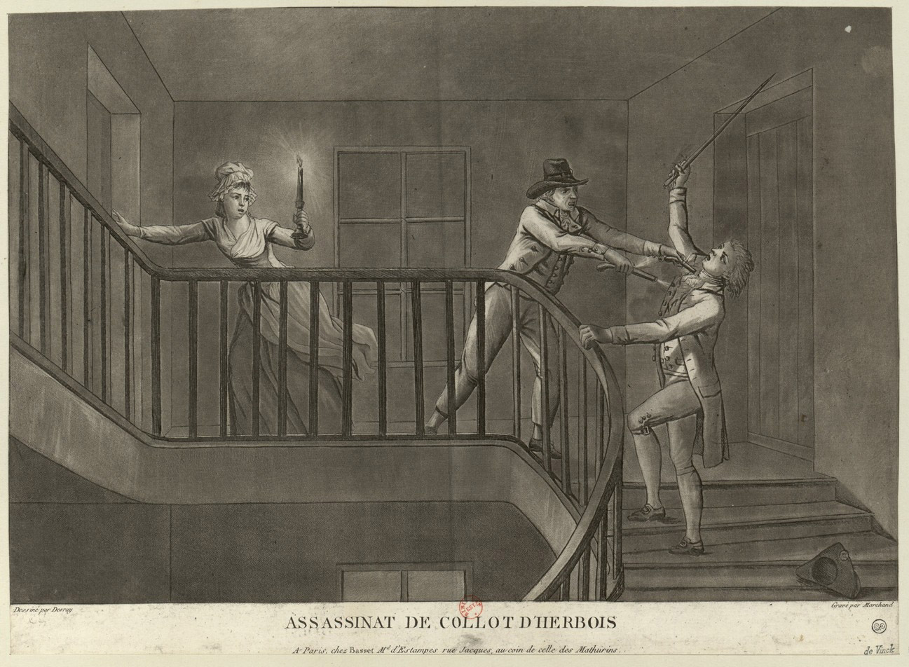 Tentative d'assassinat de Jean-Marie Collot d'Herbois par Henri Ladmiral (estampe).